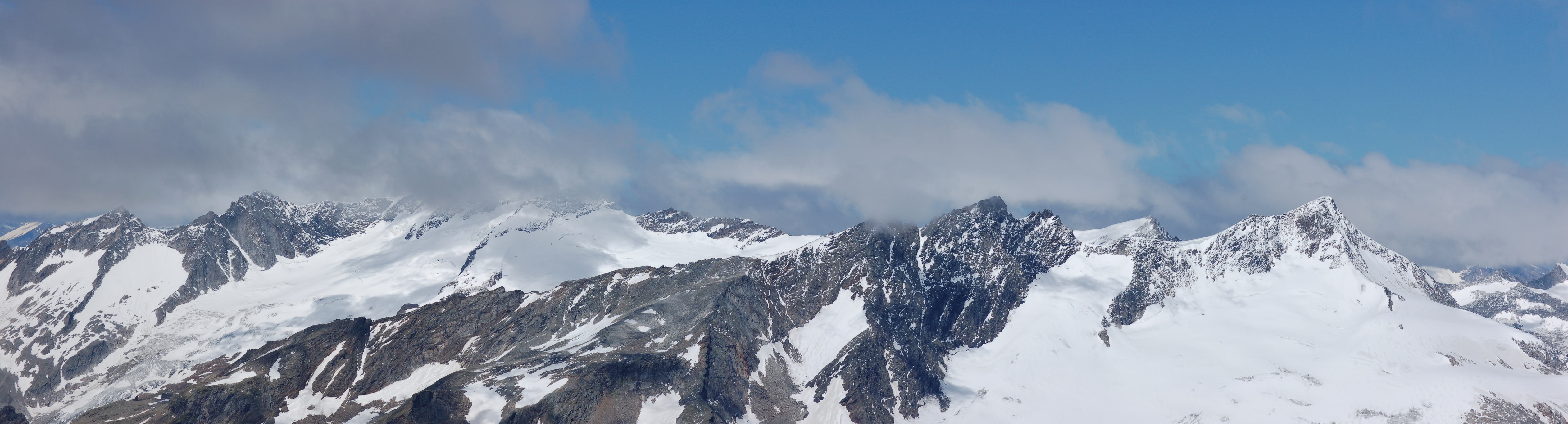 DieVenedigergruppe im Nationalpark Hohe Tauern, Osttirol. This file shows the National Park Hohe Tauern in Austria.